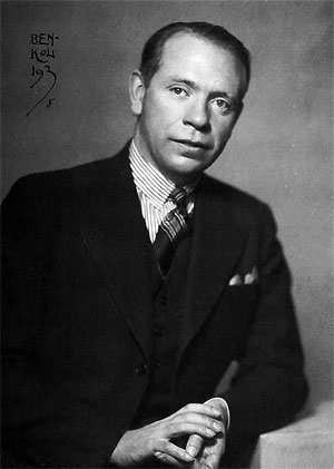 Herbert Grevenius